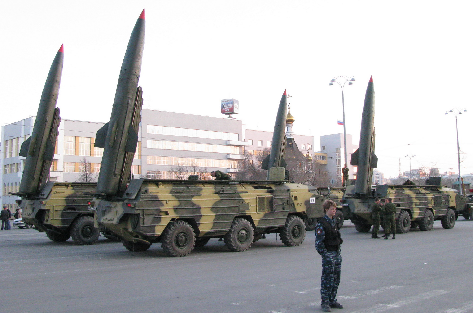 Ракетные комплексы Точка-У на репетиции парада в Екатеринбурге